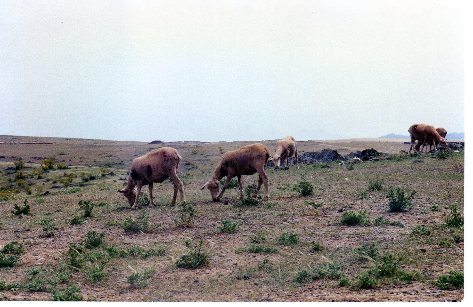 Ovejas pastando en La Serena